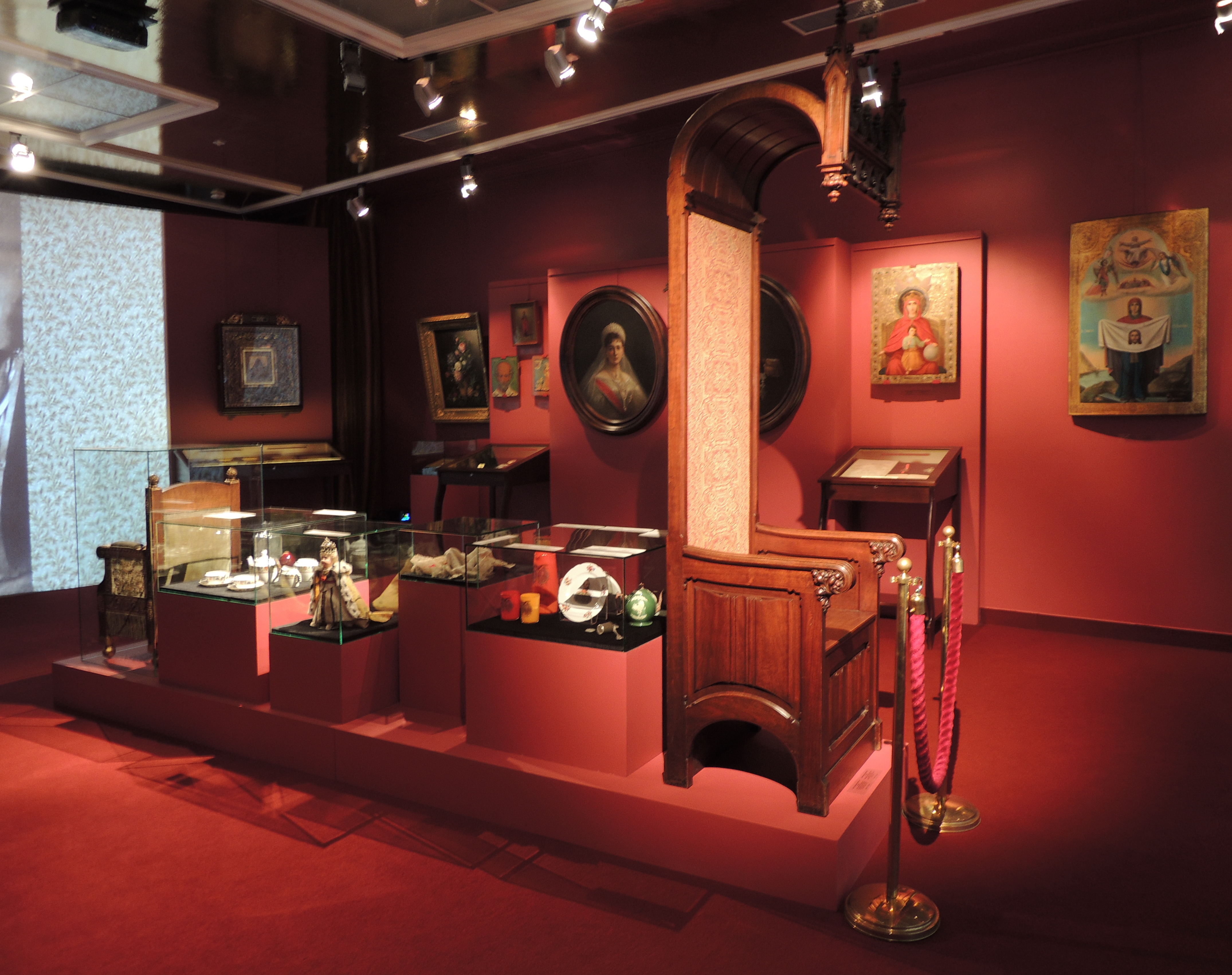 Dom Ikony na Spiridonovke